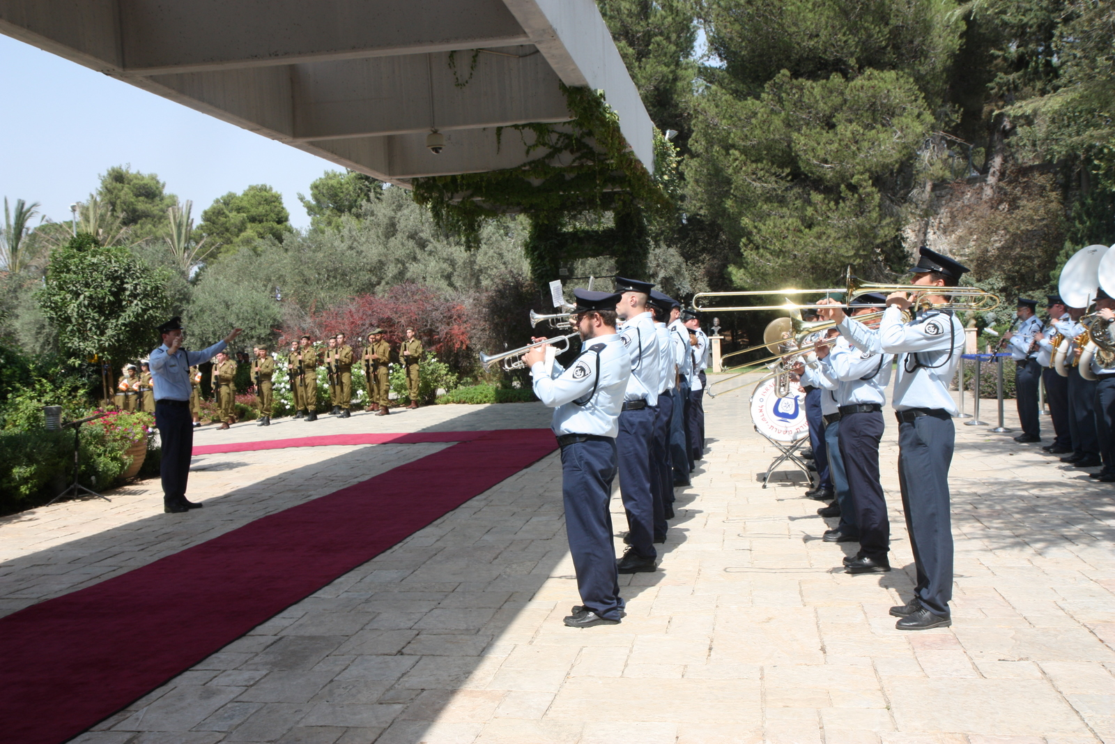 תזמורת משטרת ישראל מנגנת בבית הנשיא, 2010